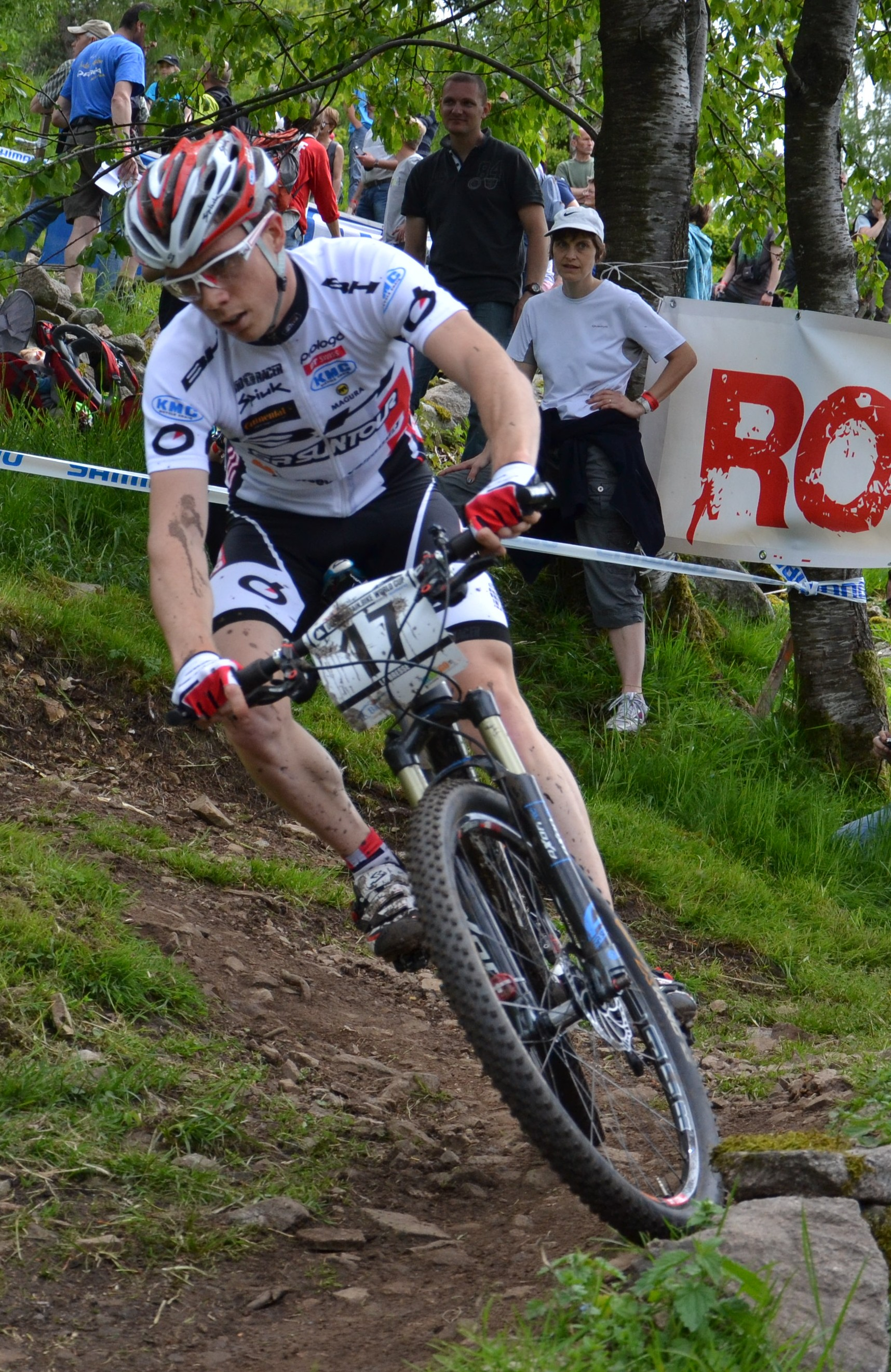 Maxime Marotte lors de la 4e manche de la coupe du monde de VTT 2012 à La Bresse (FRA).